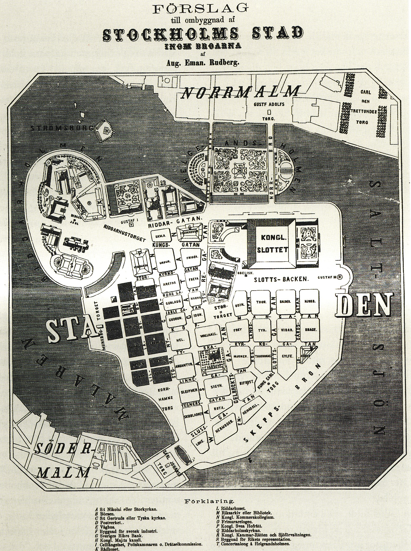 Förslag till sanering av Gamla stan, Stockholm